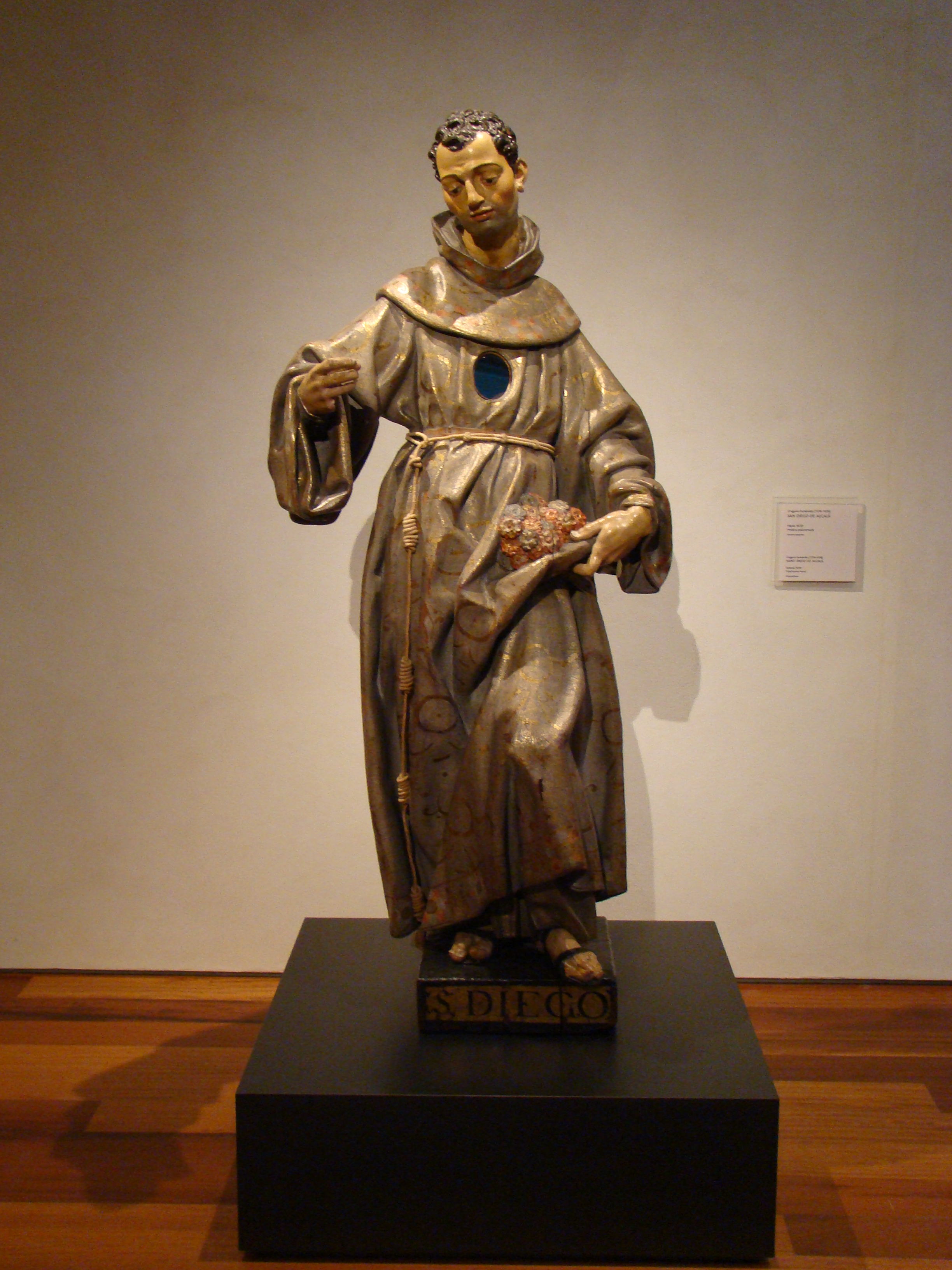 San Diego de Alcalá. Procede de la capilla de San Diego del convento de San Francisco de Valladolid. Era la imagen titular. En la actualidad está en el Museo Nacional de Escultura.